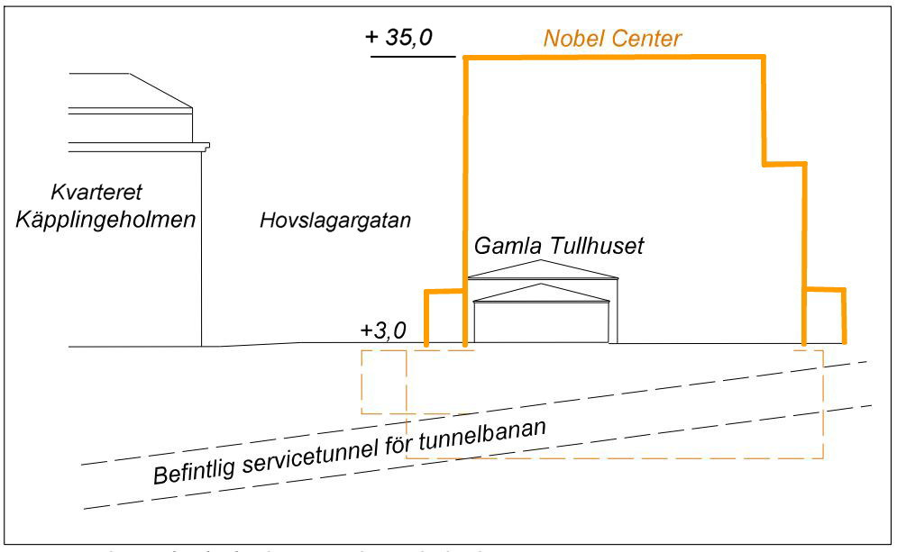 Principsektion för planerade Nobelcenter, källa Stockholms stadsbyggnadskontor